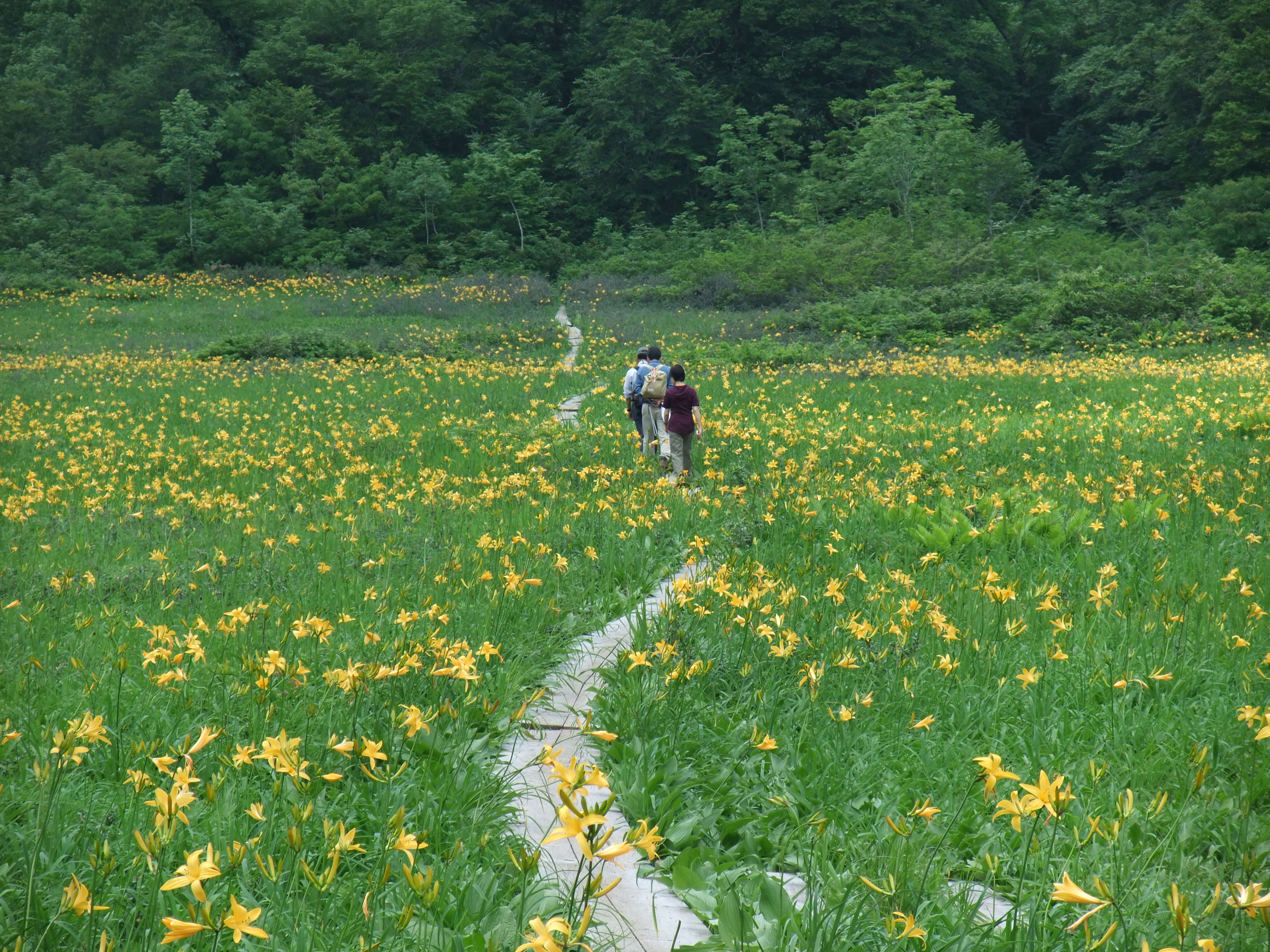 藤里駒ヶ岳北方にある田苗代湿原